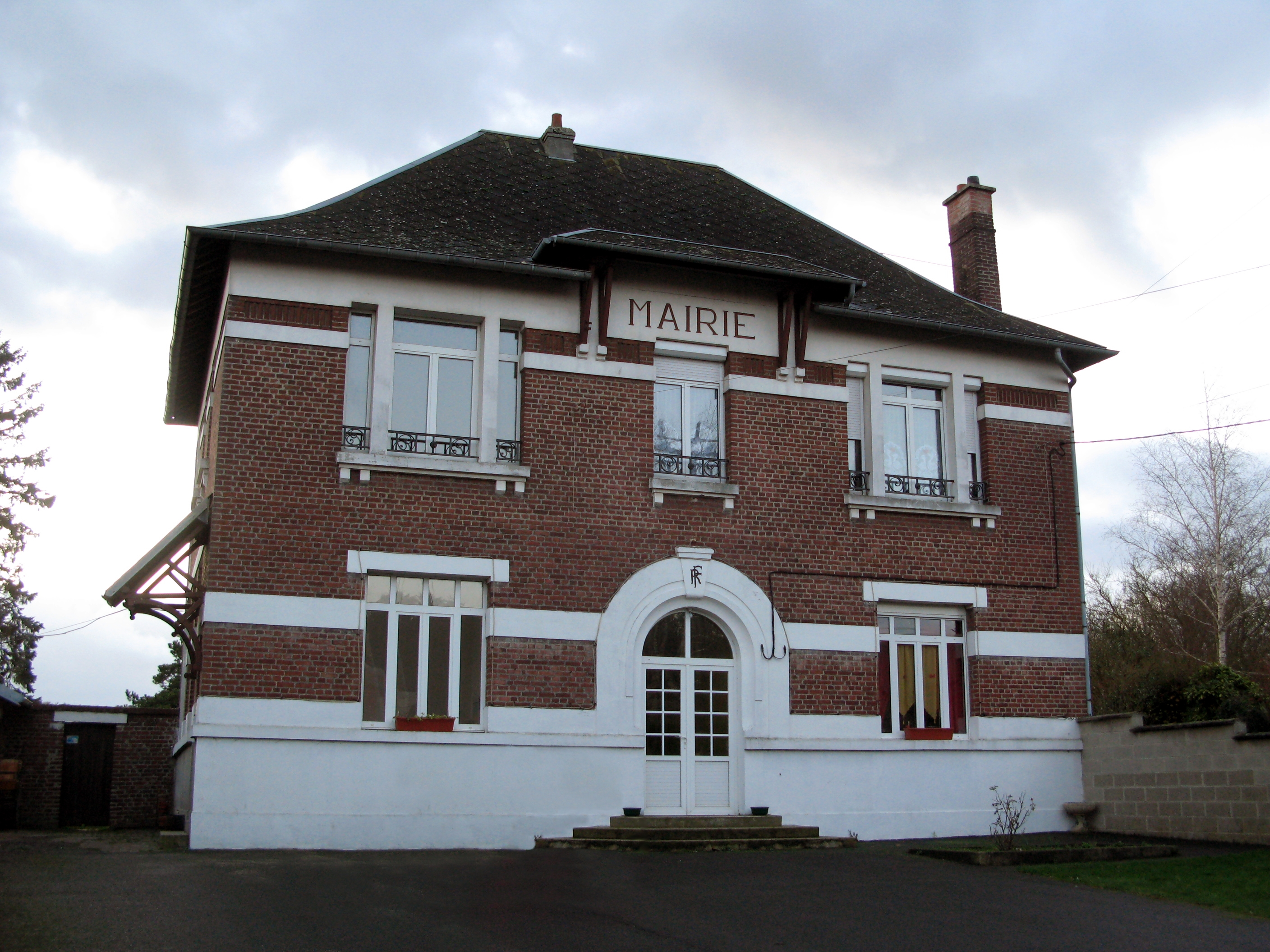 Hesbécourt (Somme, France) - La mairie fait juste face à l'église, de l'autre côté de la rue. .